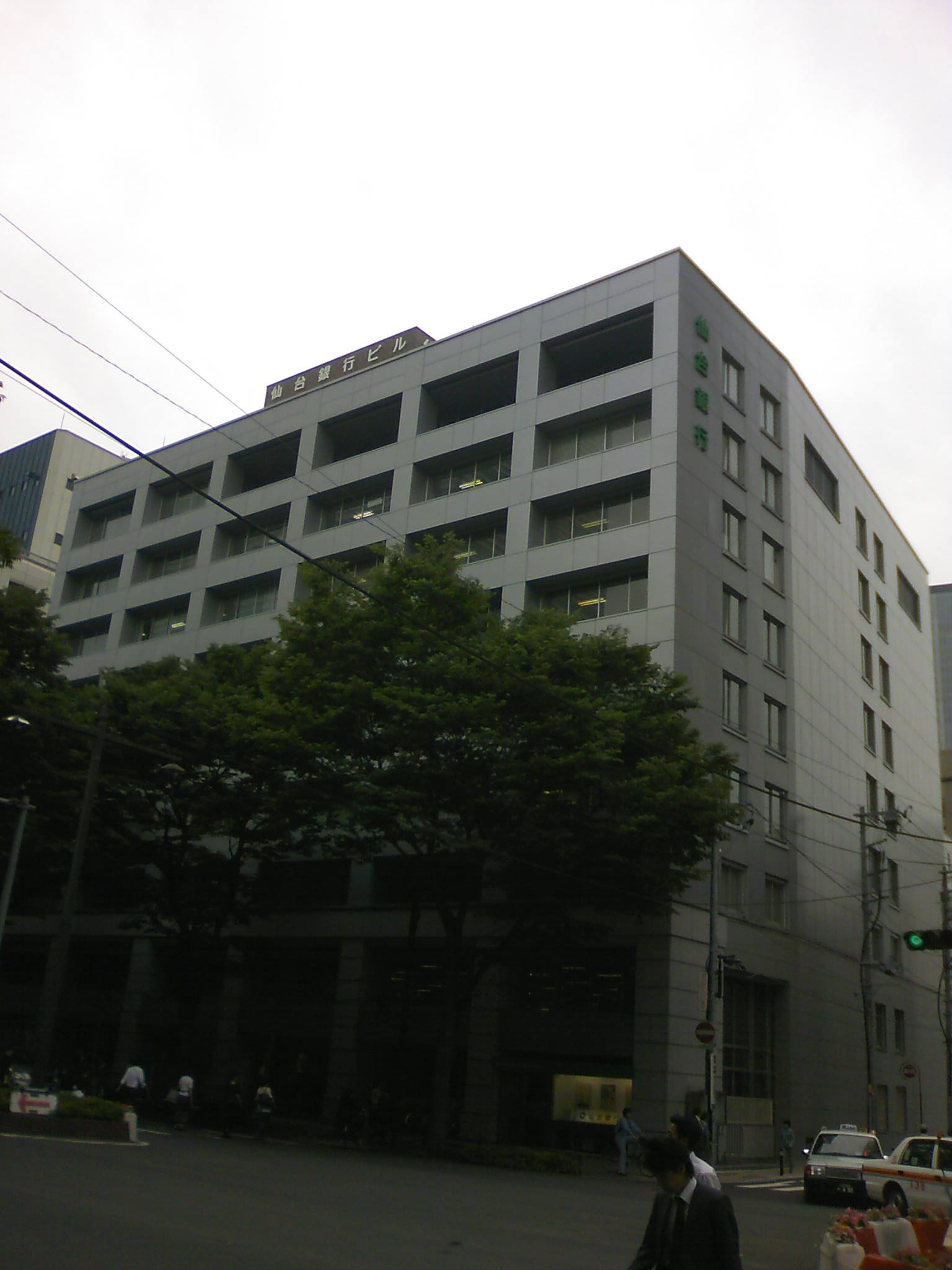 仙台銀行本店ビル